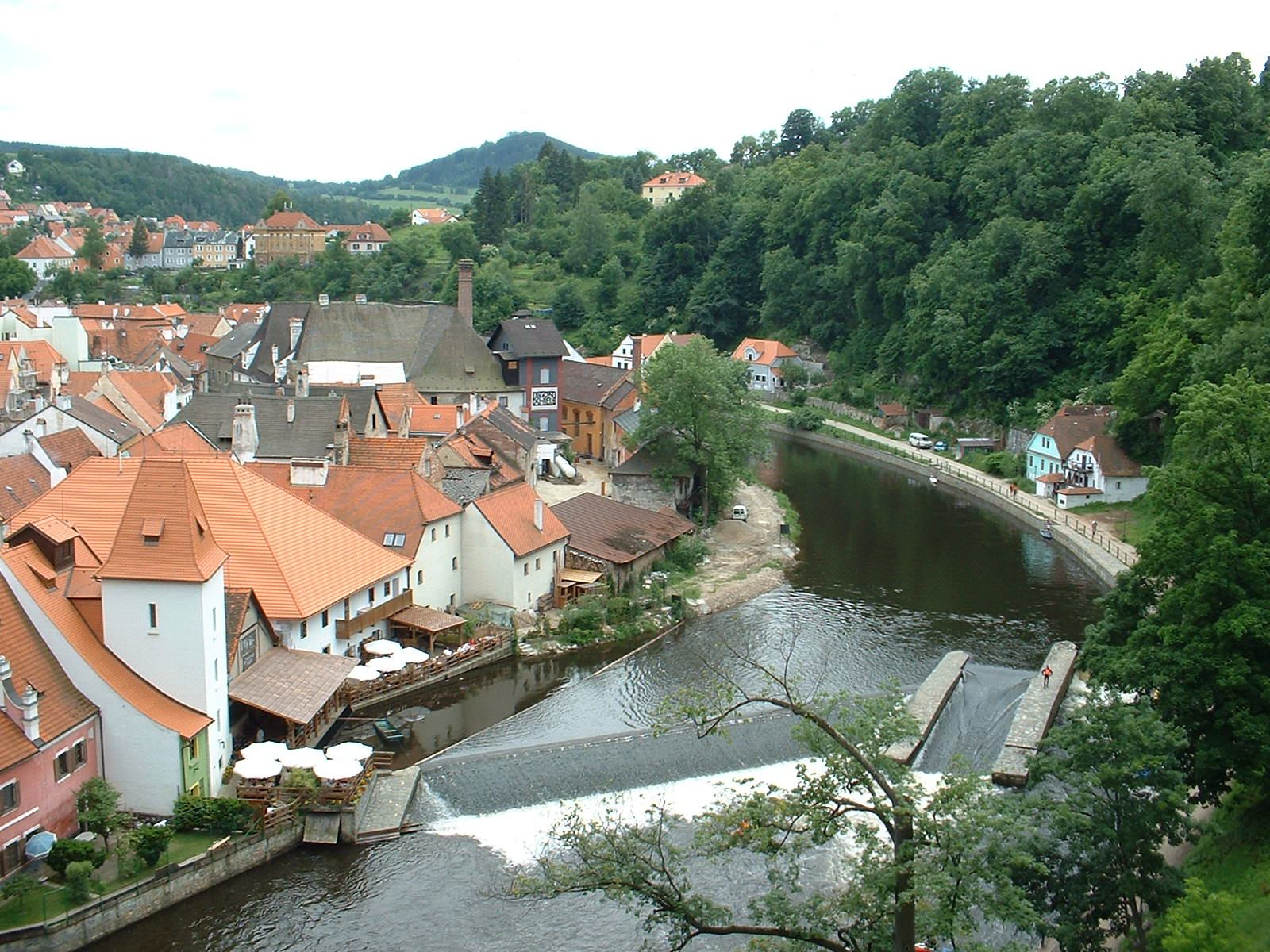 Moldau, Vltava.